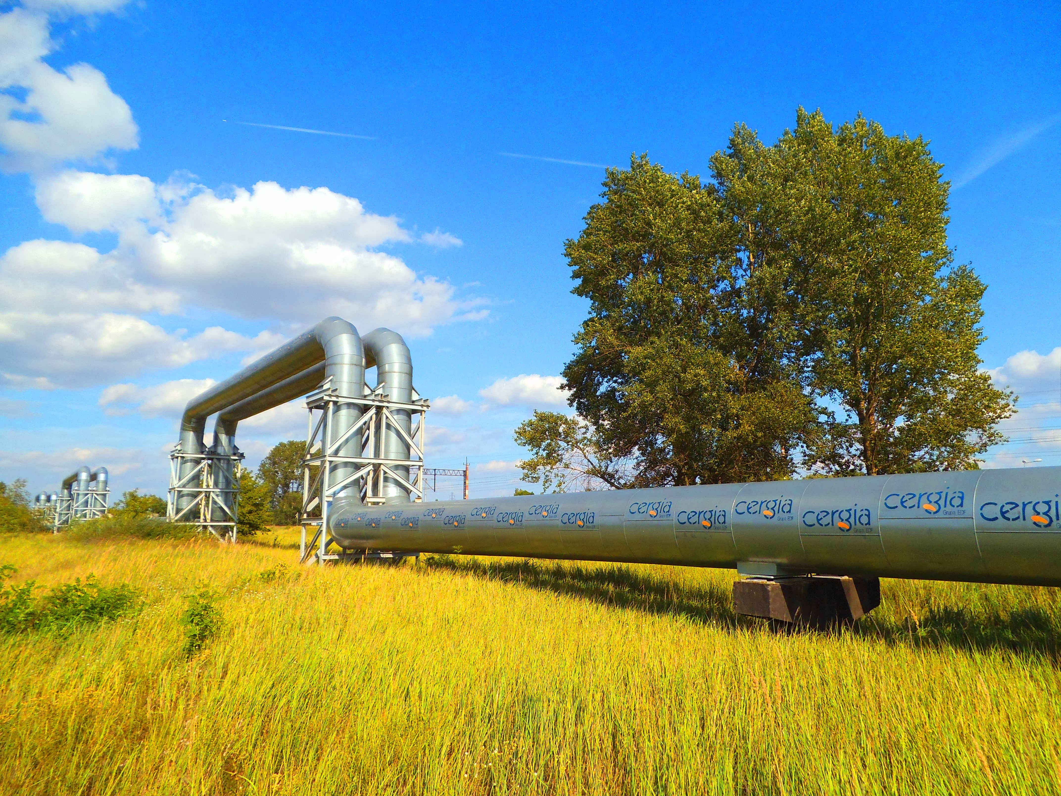 Fragment sieci ciepłowniczej w Toruniu11